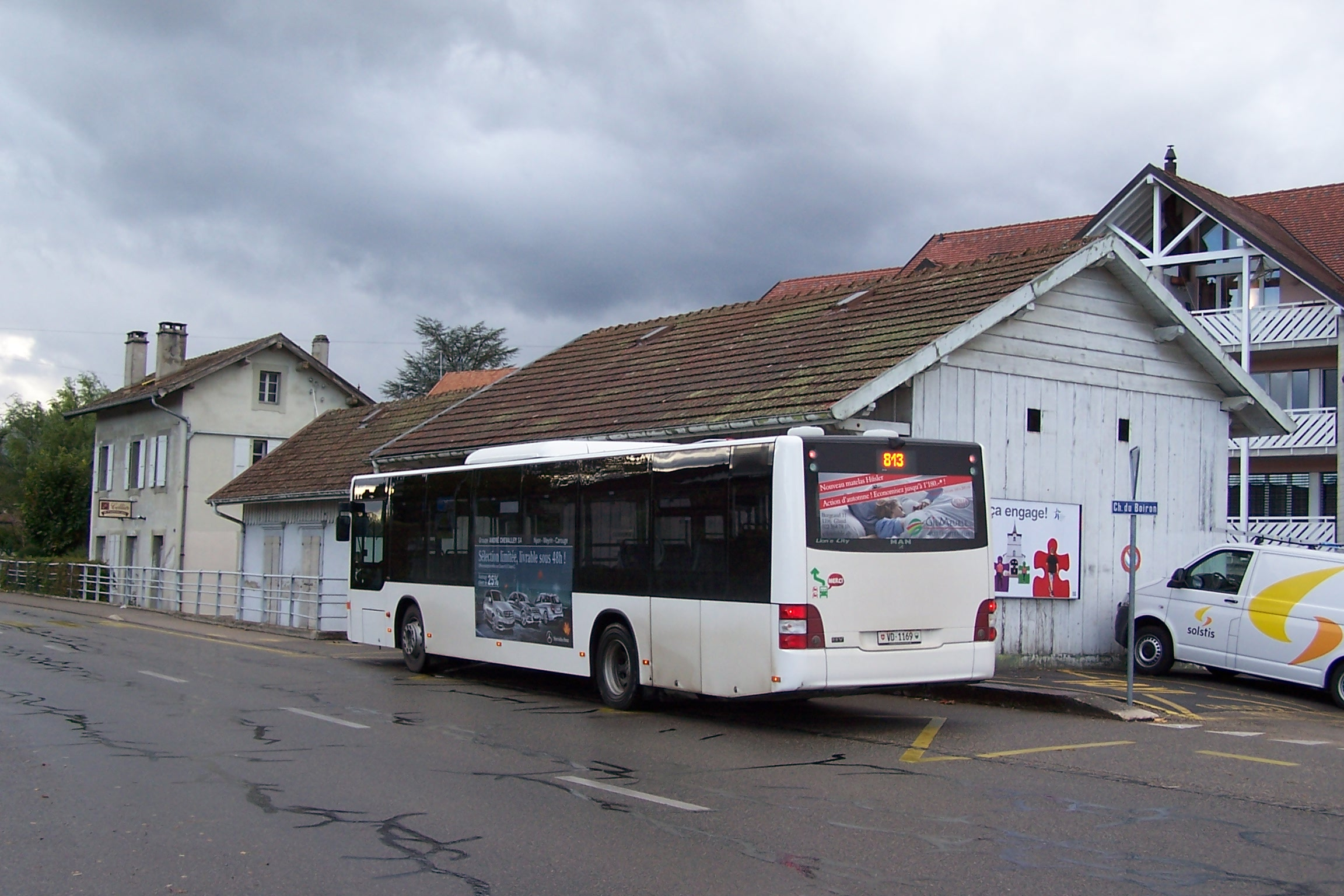 Ehemaliger Bahnhof Crassier-La Rippe an der abgebauten Bahnstrecke Nyon–Crassier. Im Vordergrund steht ein MAN Lion's City Bus der TPN (Transports publics de la région nyonnaise).